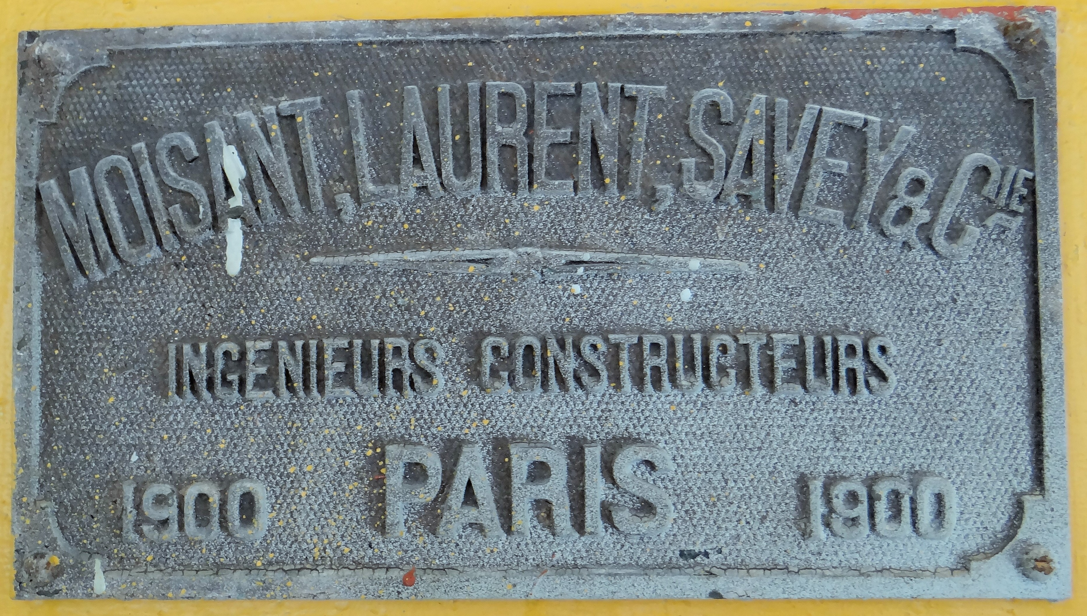 plaque "1900, Moisant, Laurent, Savey & Cie, ingénieurs-constructeurs", escaliers du Grand Palais, Paris .